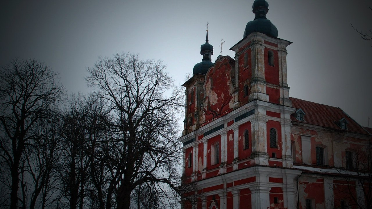 Костел Іоанна Хрестителя